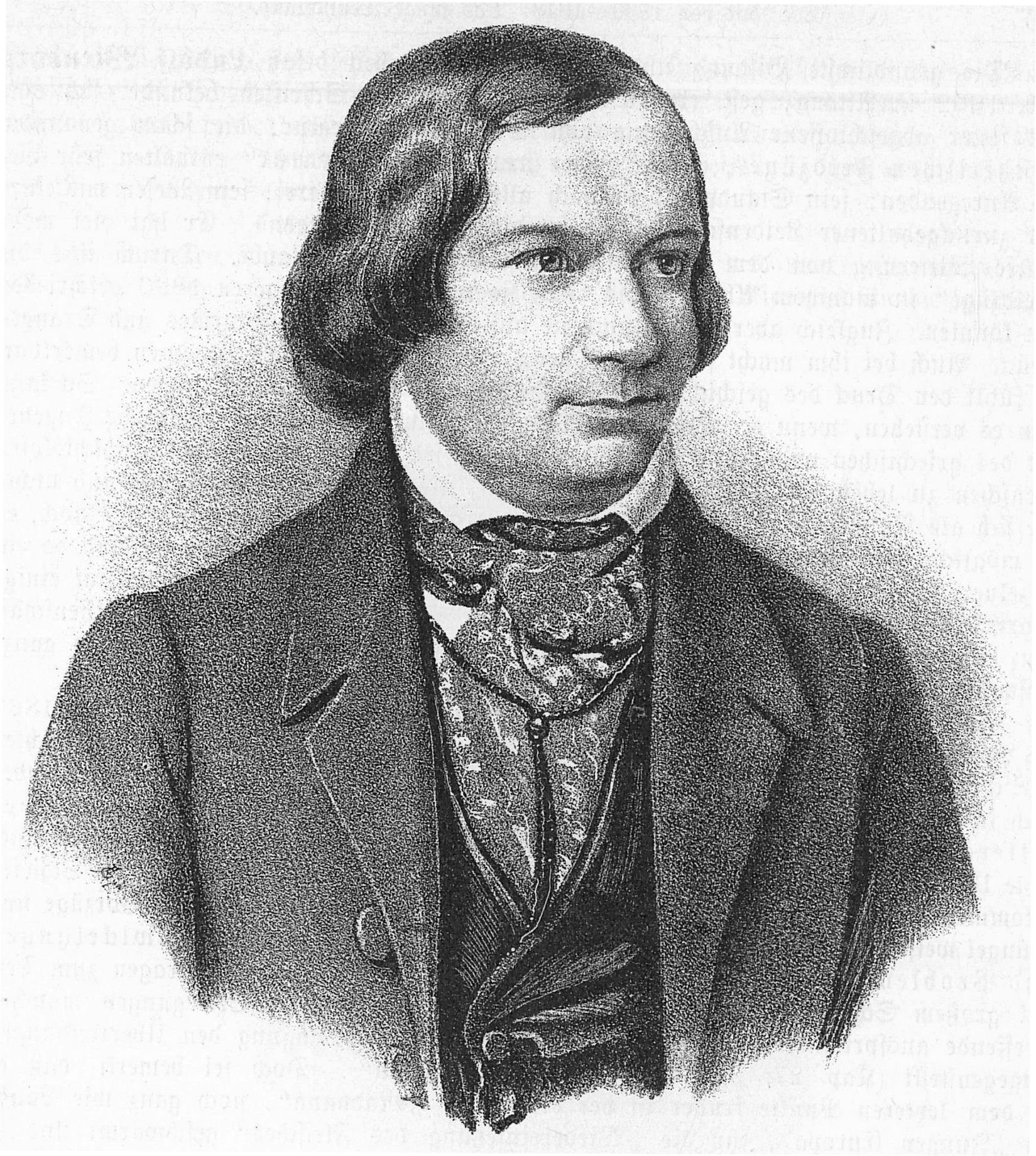 Litographie des deutschen Schriftstellers Theodor Mundt (1808-1861).